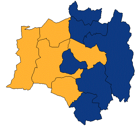 !Template:Llegenda}